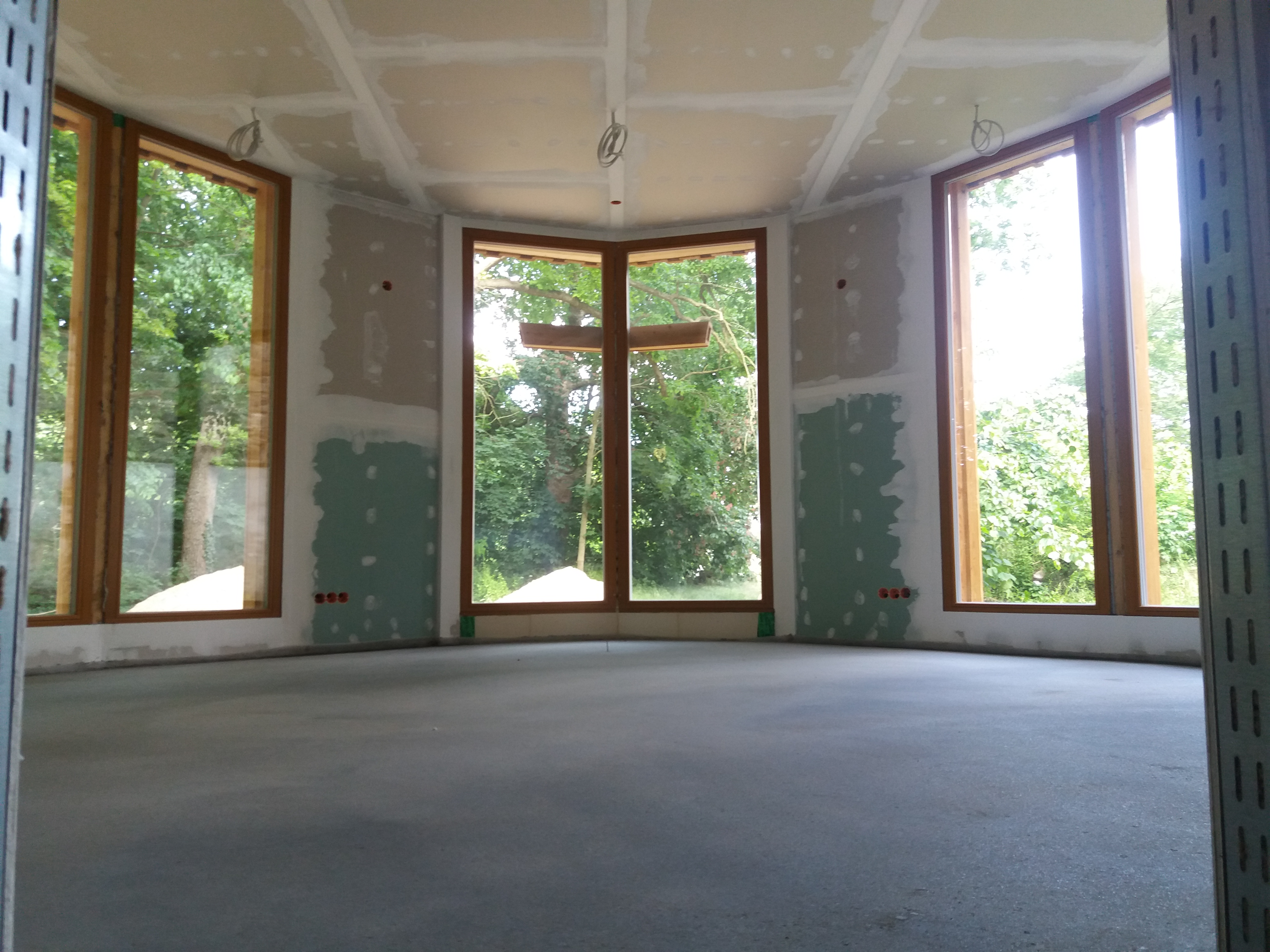 Seit 2019 baut die Kirchengemeinde Zerrenthin in Rollwitz ein neues Gemeindehaus. Es hat die Form eines Schiffes und ist 15m lang und 8m breit. Vom Versammlungssaal schaut man direkt auf den alten Friedhof neben der Feldsteinkirche von Rollwitz.